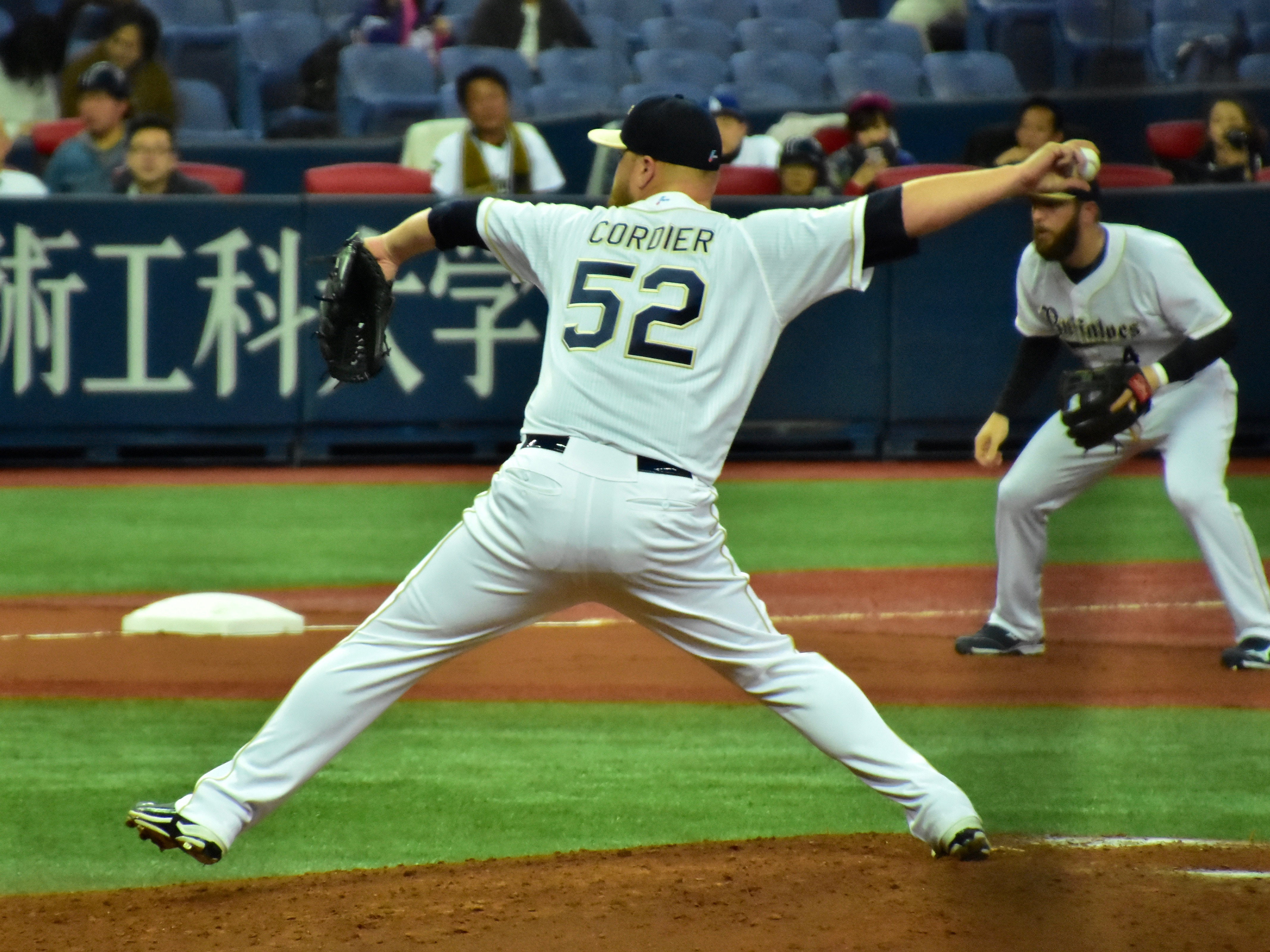 コーディエ 2016年3月17日京セラドーム大阪にて